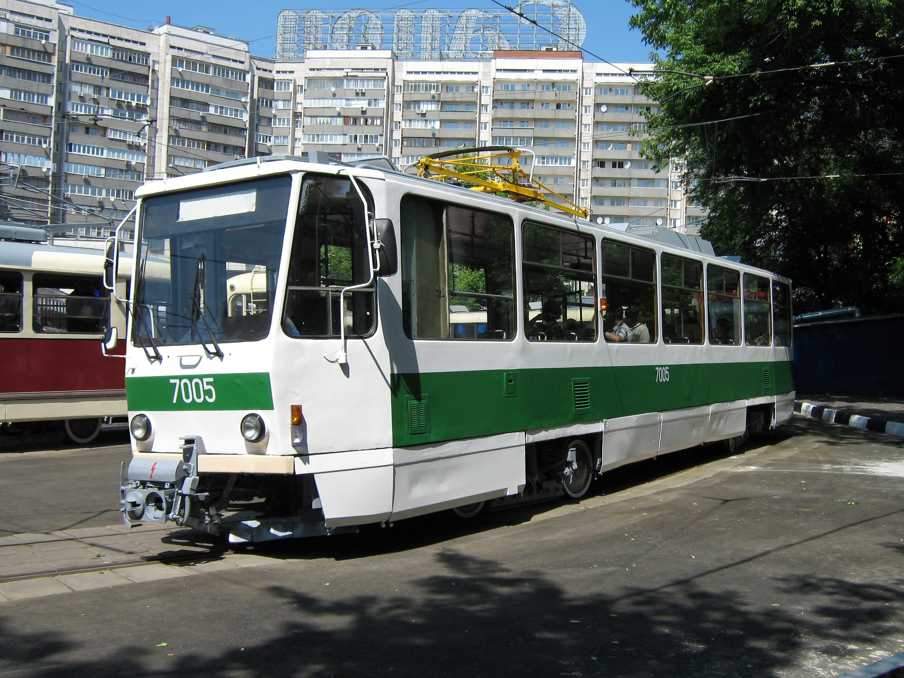 Трамвайный вагон Tatra T7B5 в Москве